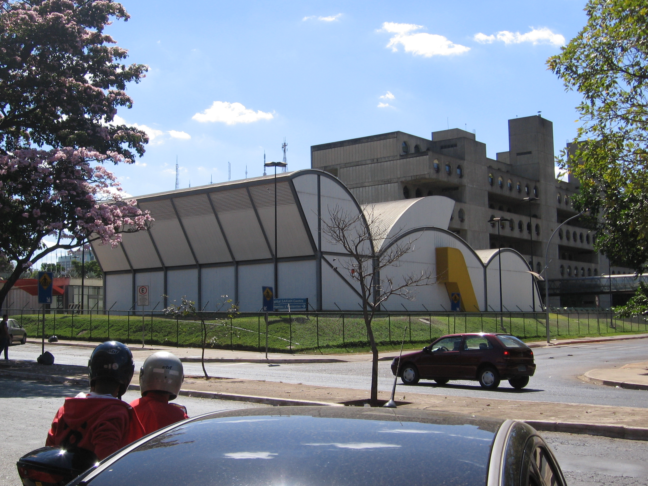 Hospital Sarah Kubitschek in Brasilia, Brazil